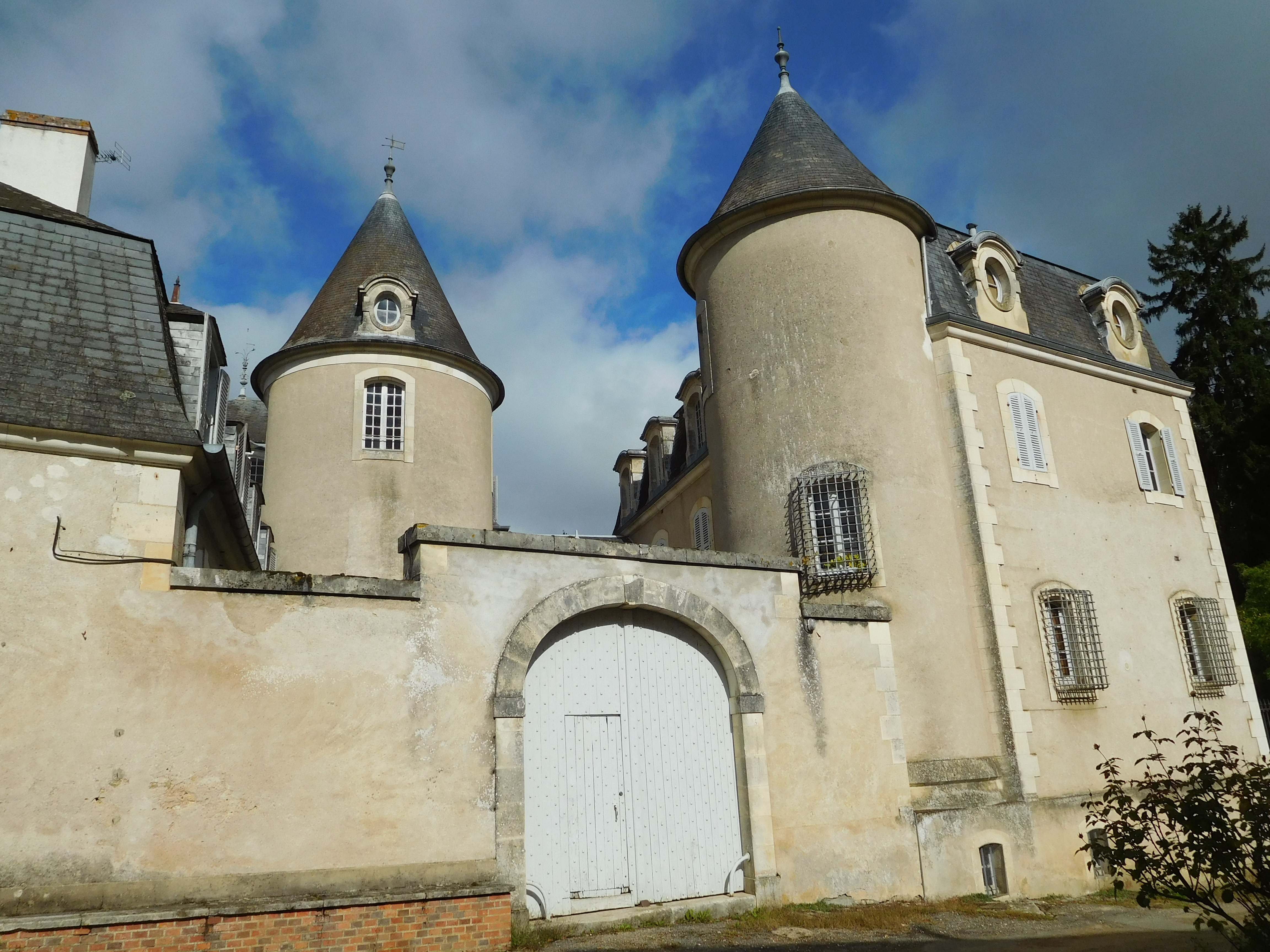 Tours du château de Thauvenay (Cher, Centre-Val de Loire, France).